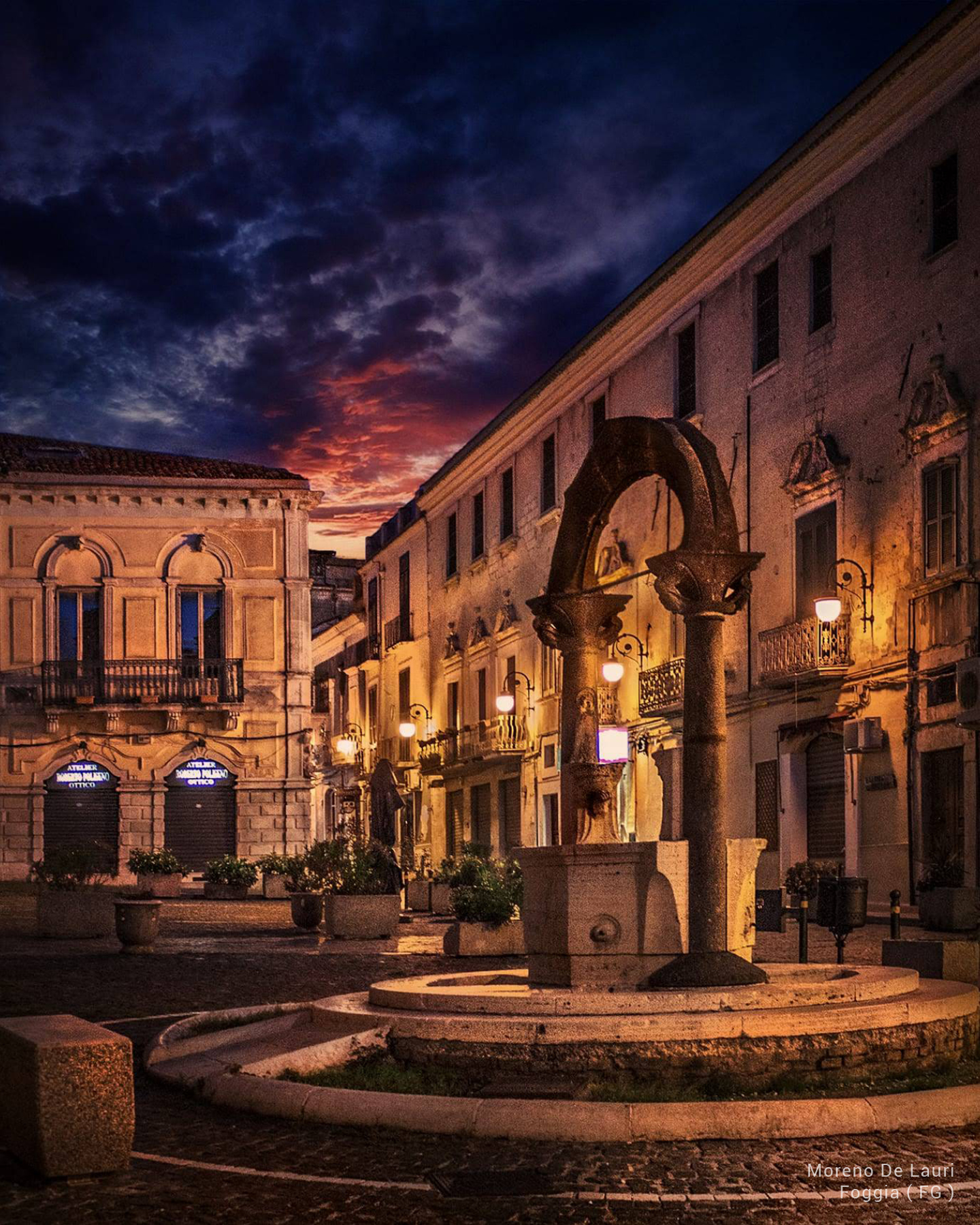 Antico pozzo risalente al medioevo, appartenente alla residenza reale dell'imperatore Federico II. Uno dei pochi resti dopo il terribile terremoto del 700.